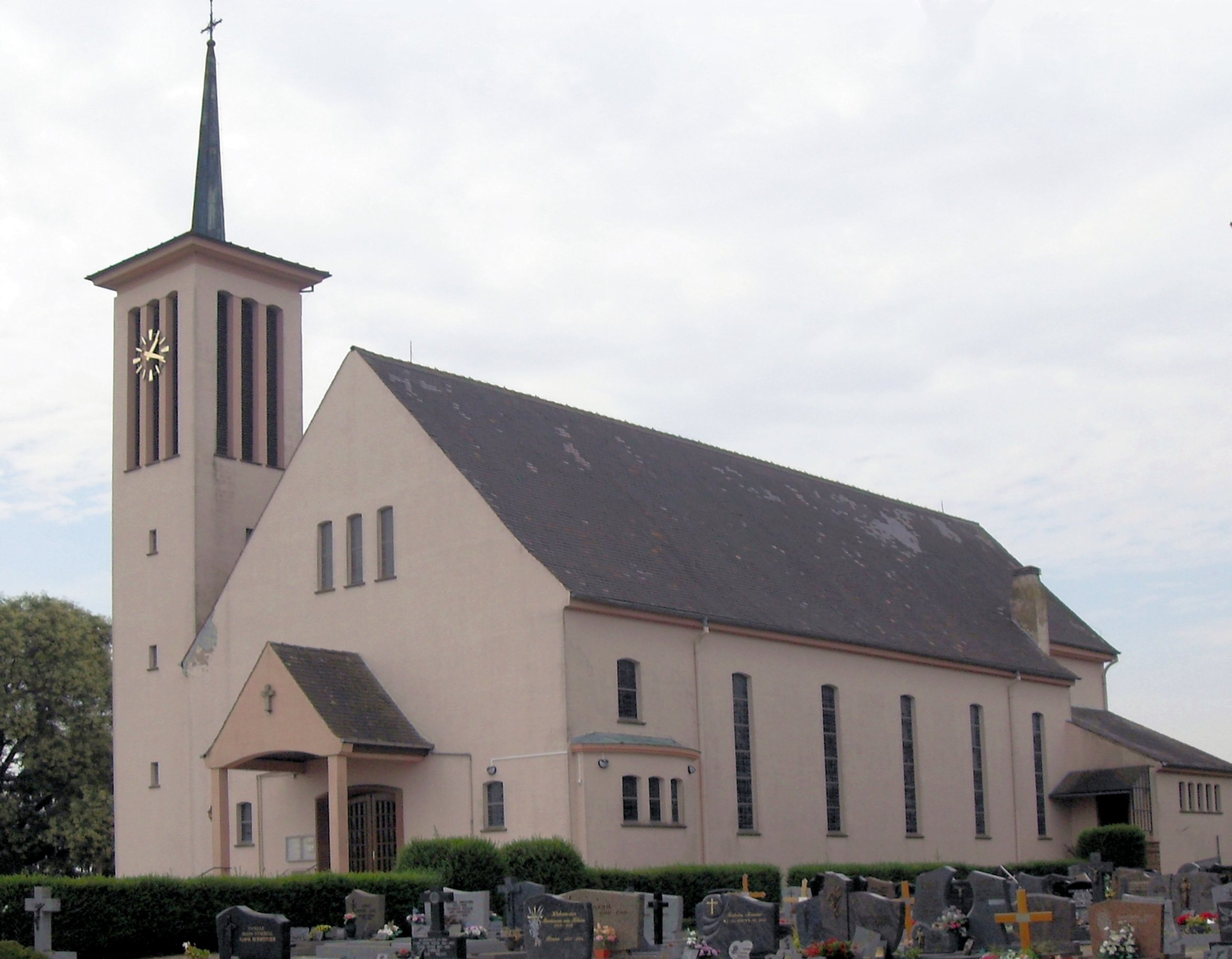 L'église Saint-Georges à Stundwiller